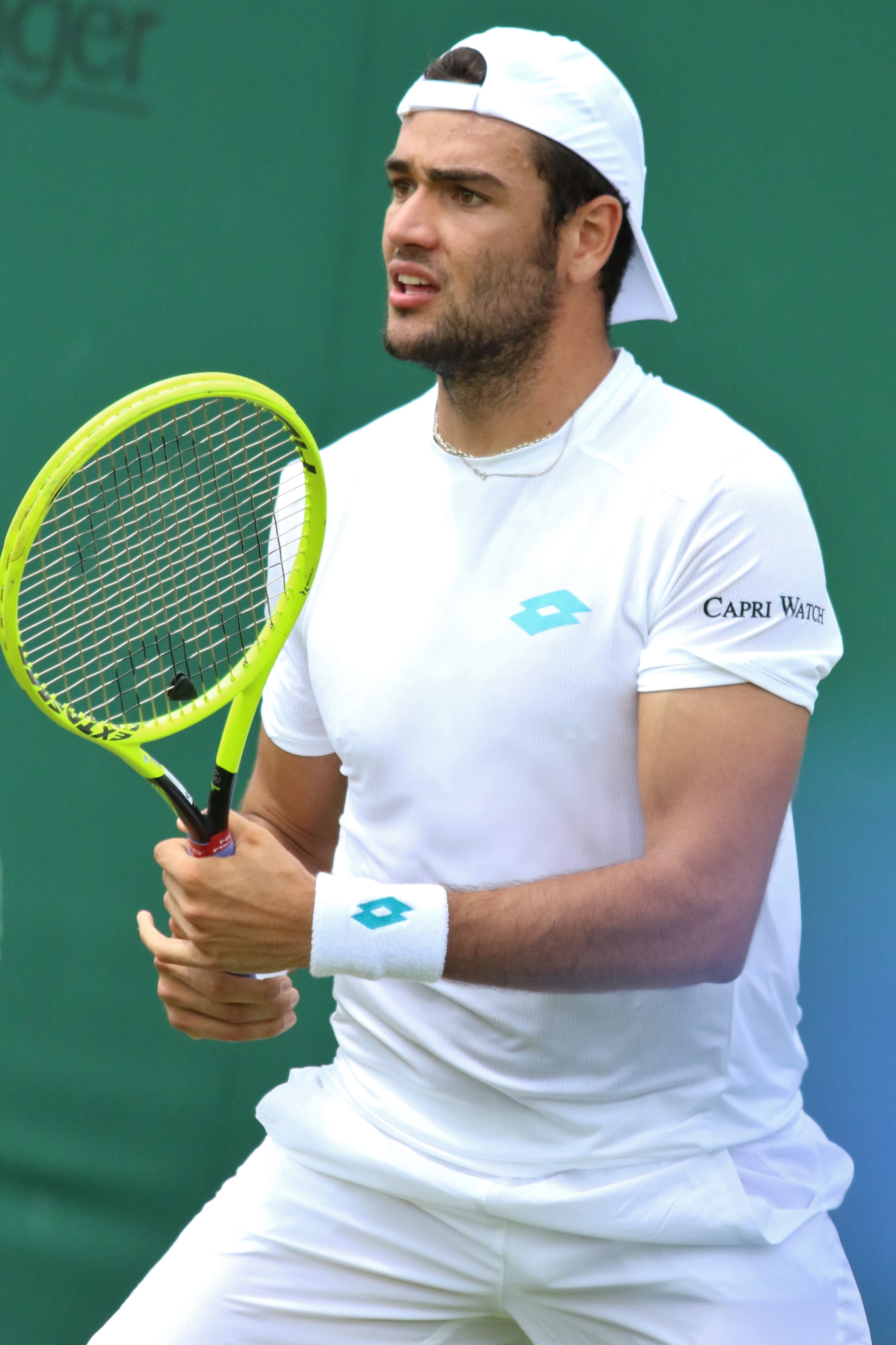 Berrettini WM19 (4)